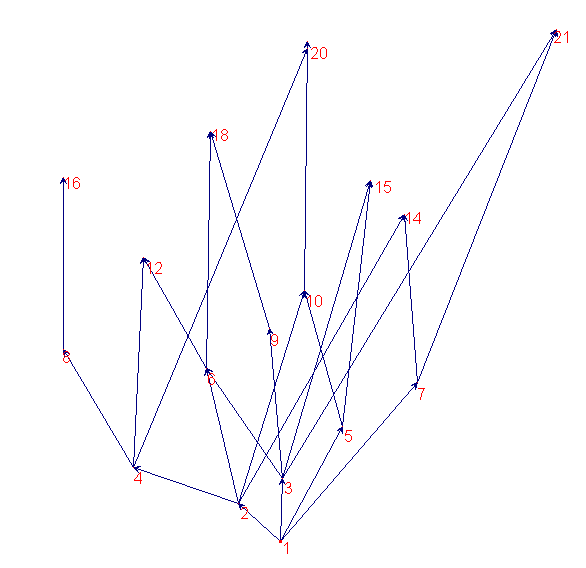 grafo della divisibilità (prodotto da me)